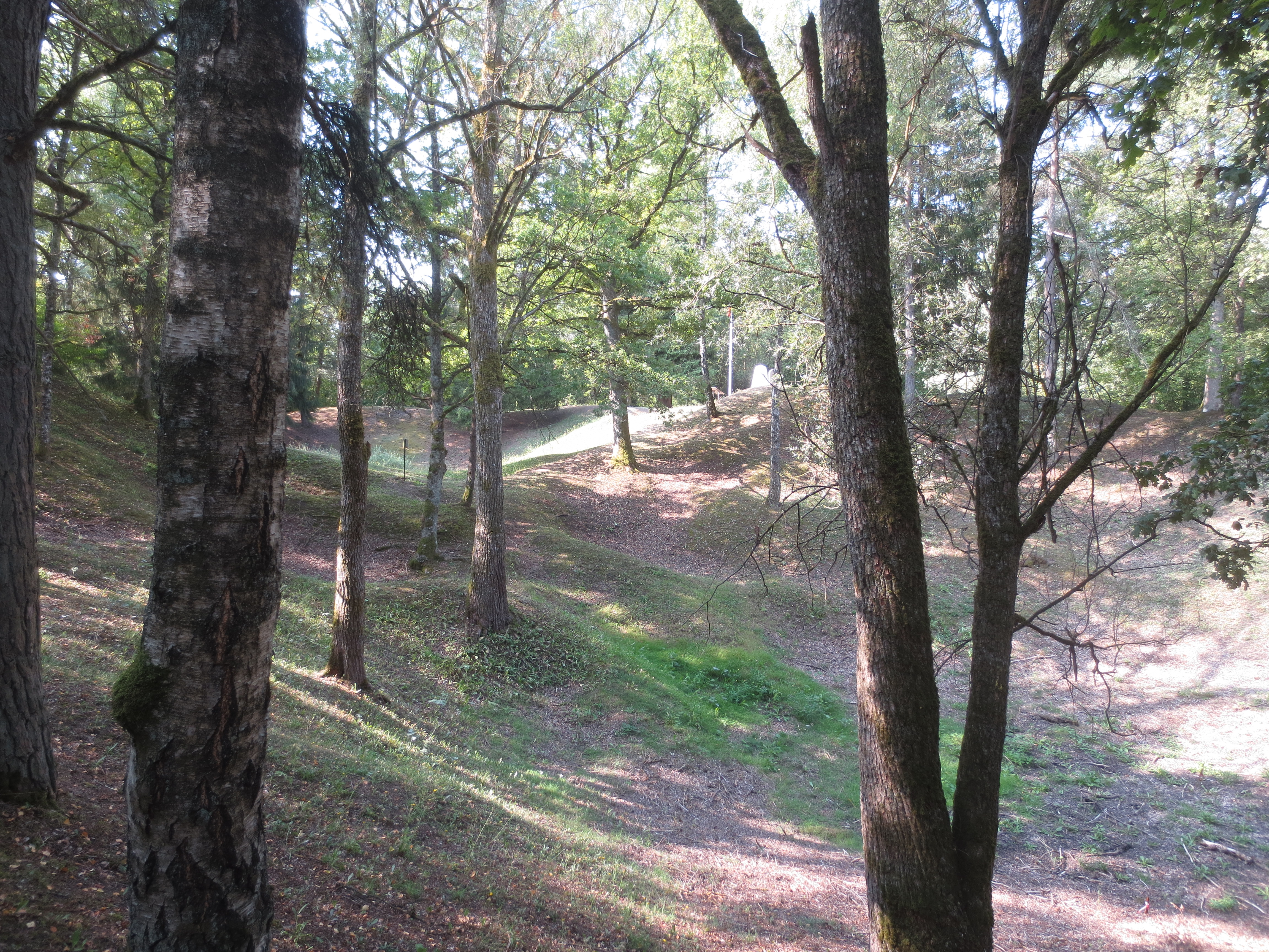 Les entonnoirs de Leintrey - Vue sur un entonnoir - 003